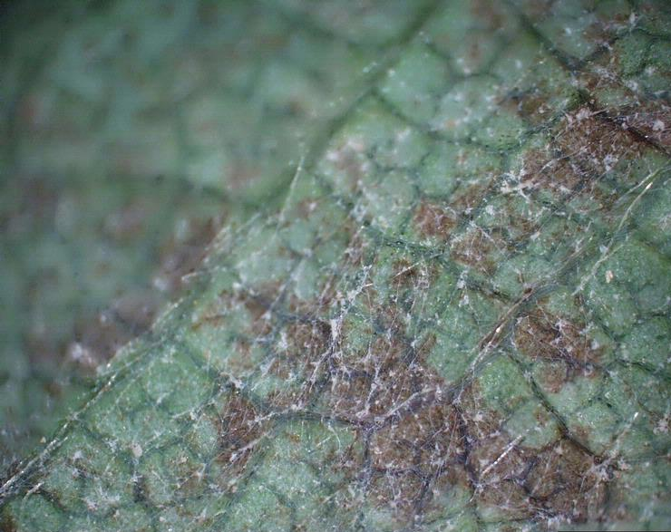 Podosphaera aphanis (Wallr.) U. Braun & S. Takam, symptômes d'oïdium du fraisier sur feuilles (Fragaria x ananassa Duchesne ex Rozier)